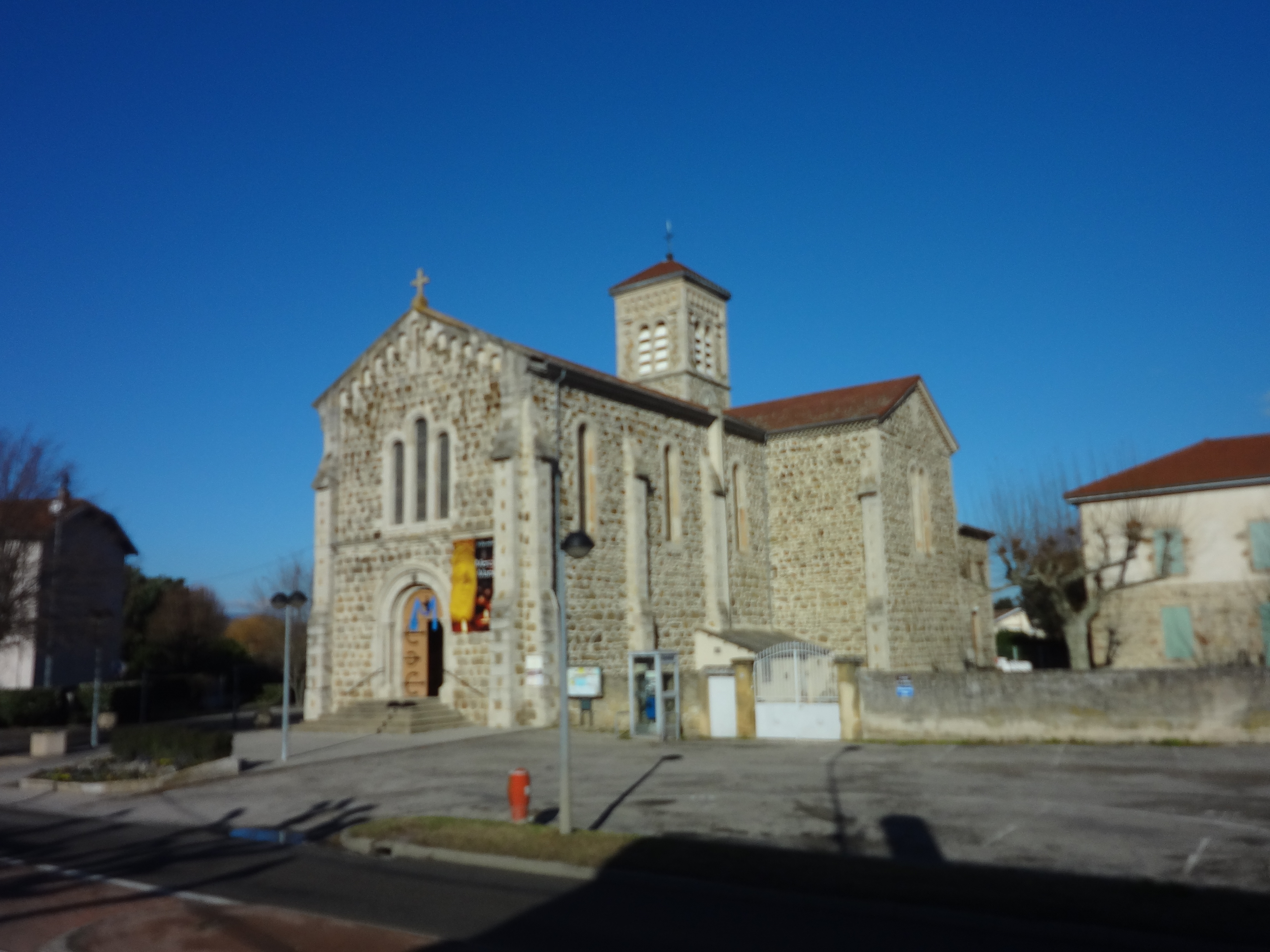 Église Saint-Ferréol de Sablons (38).